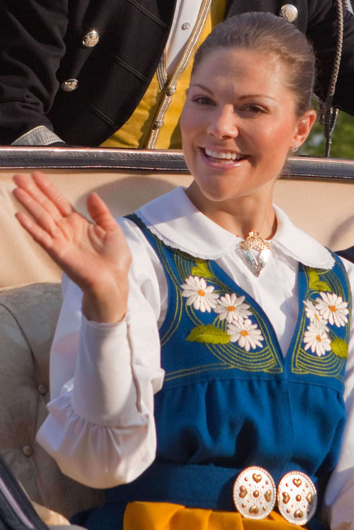 Sveriges Nationaldag 2010, Skansen, Stockholm. Kronprinsessan Victoria och soon to be make Daniel Westling